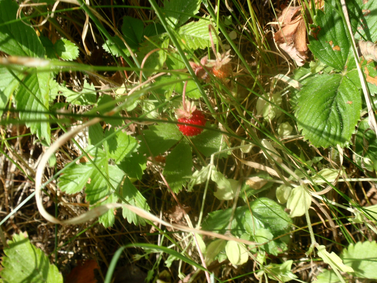 Jahodník